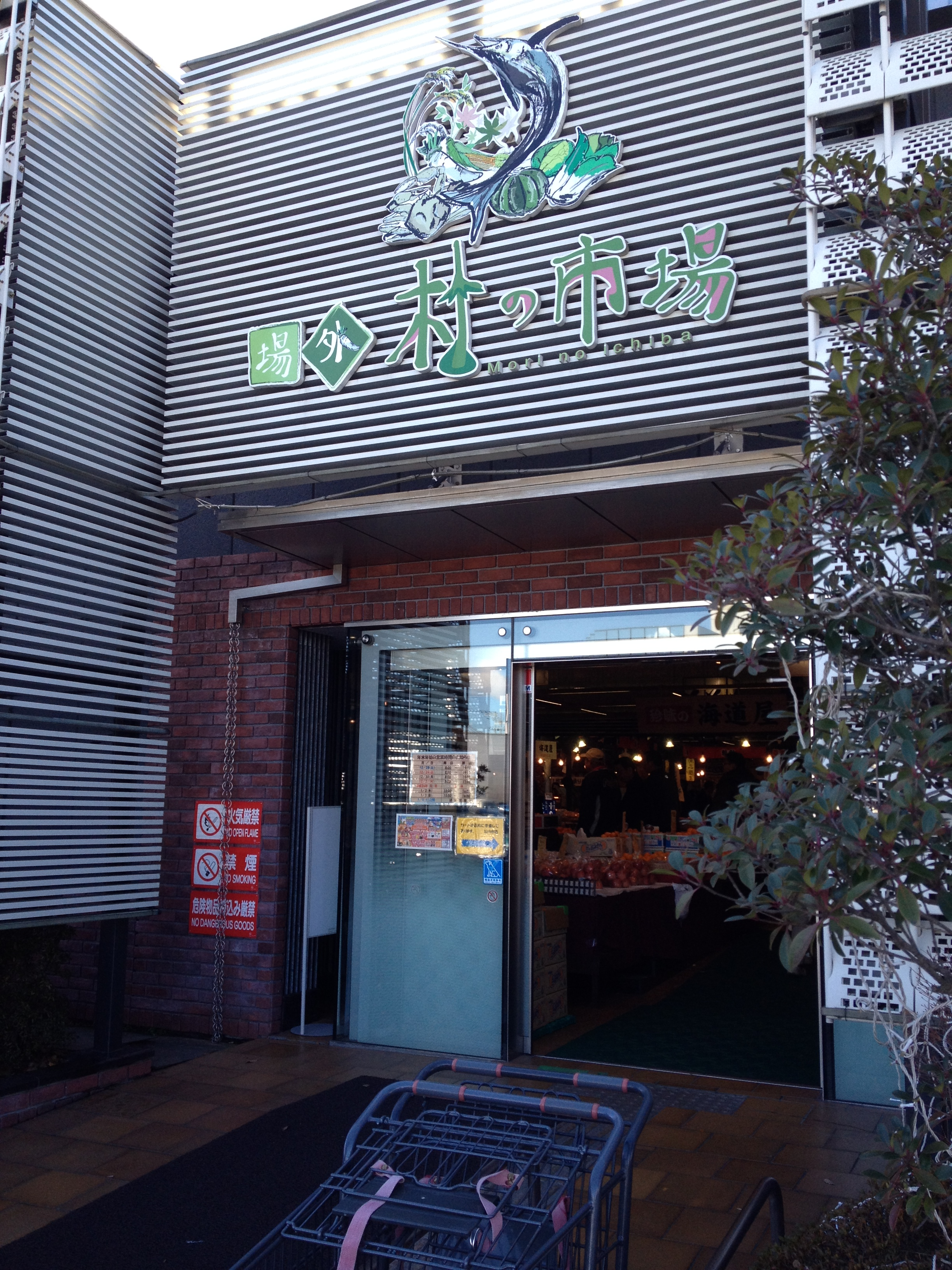 杜の市場 入口（仙台市若林区）